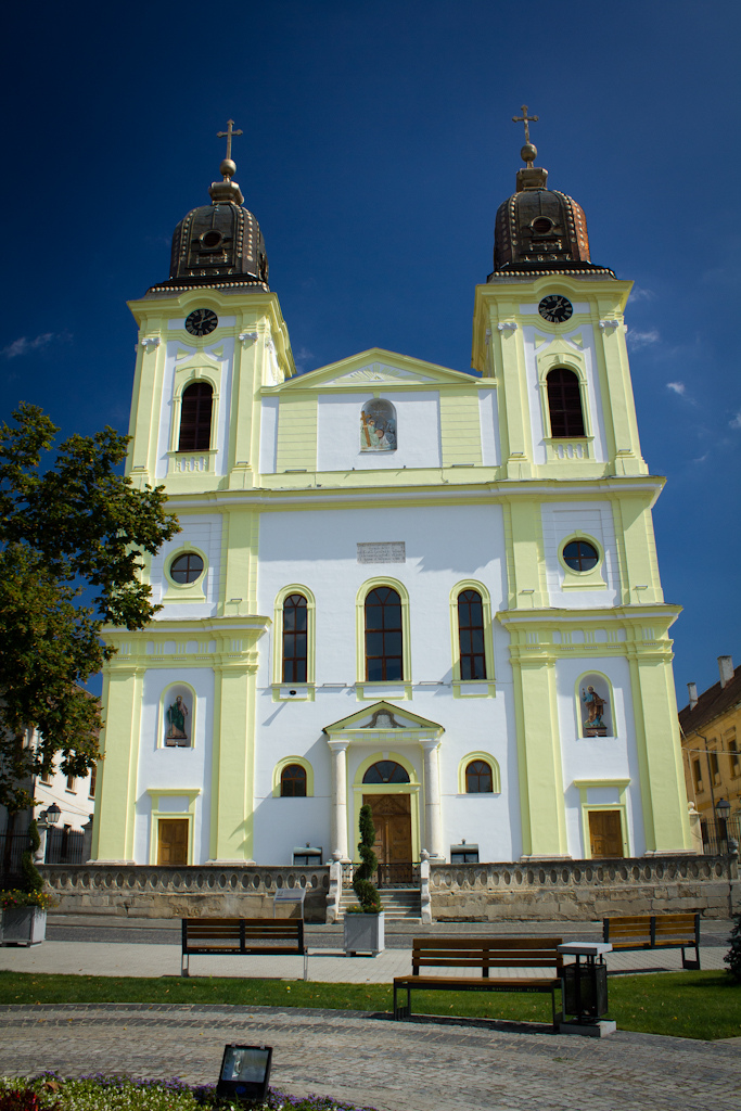 Catedrala greco-catolică "Sf. Treime"